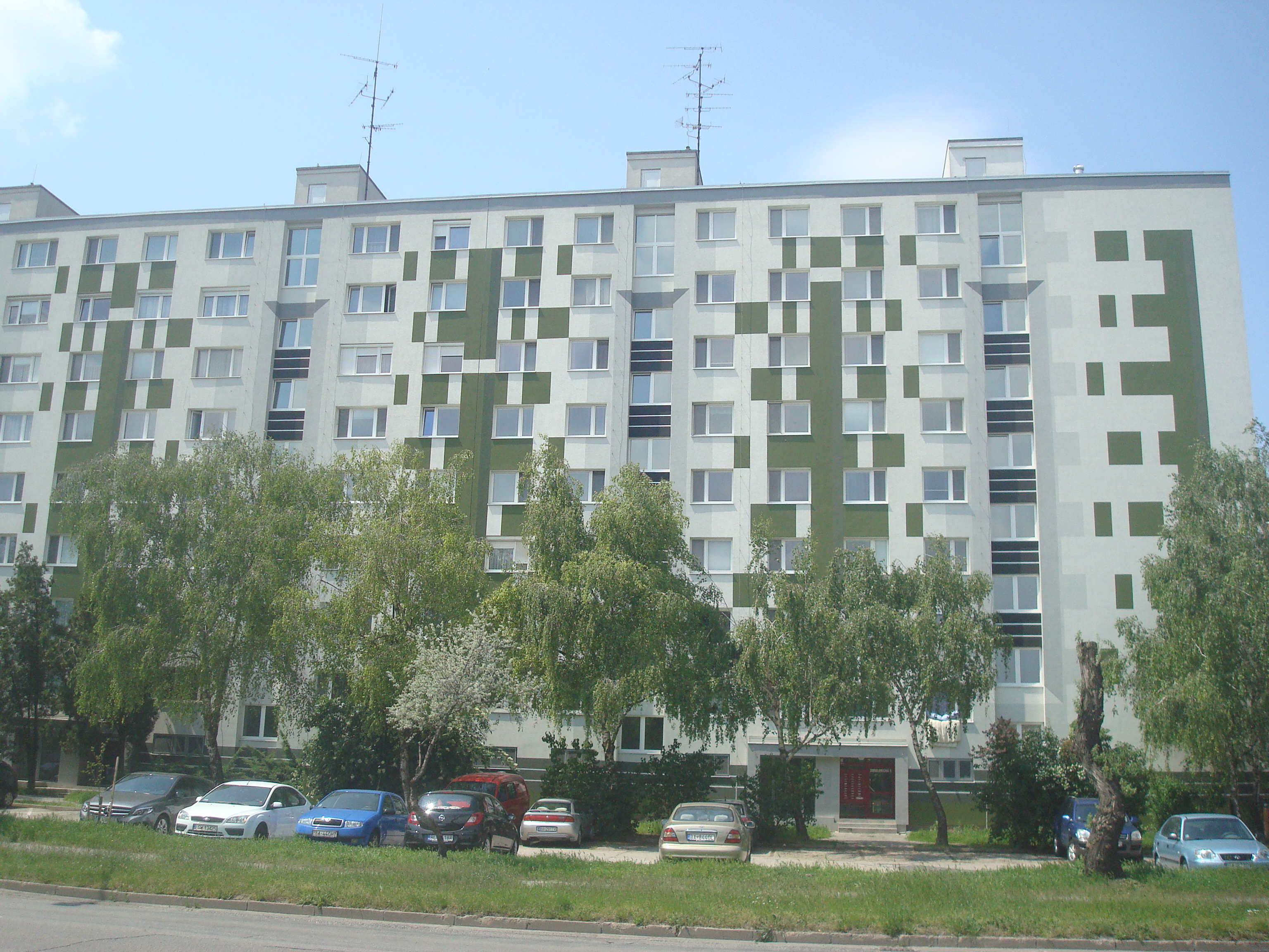 Smolenická street, Petržalka, Bratislava